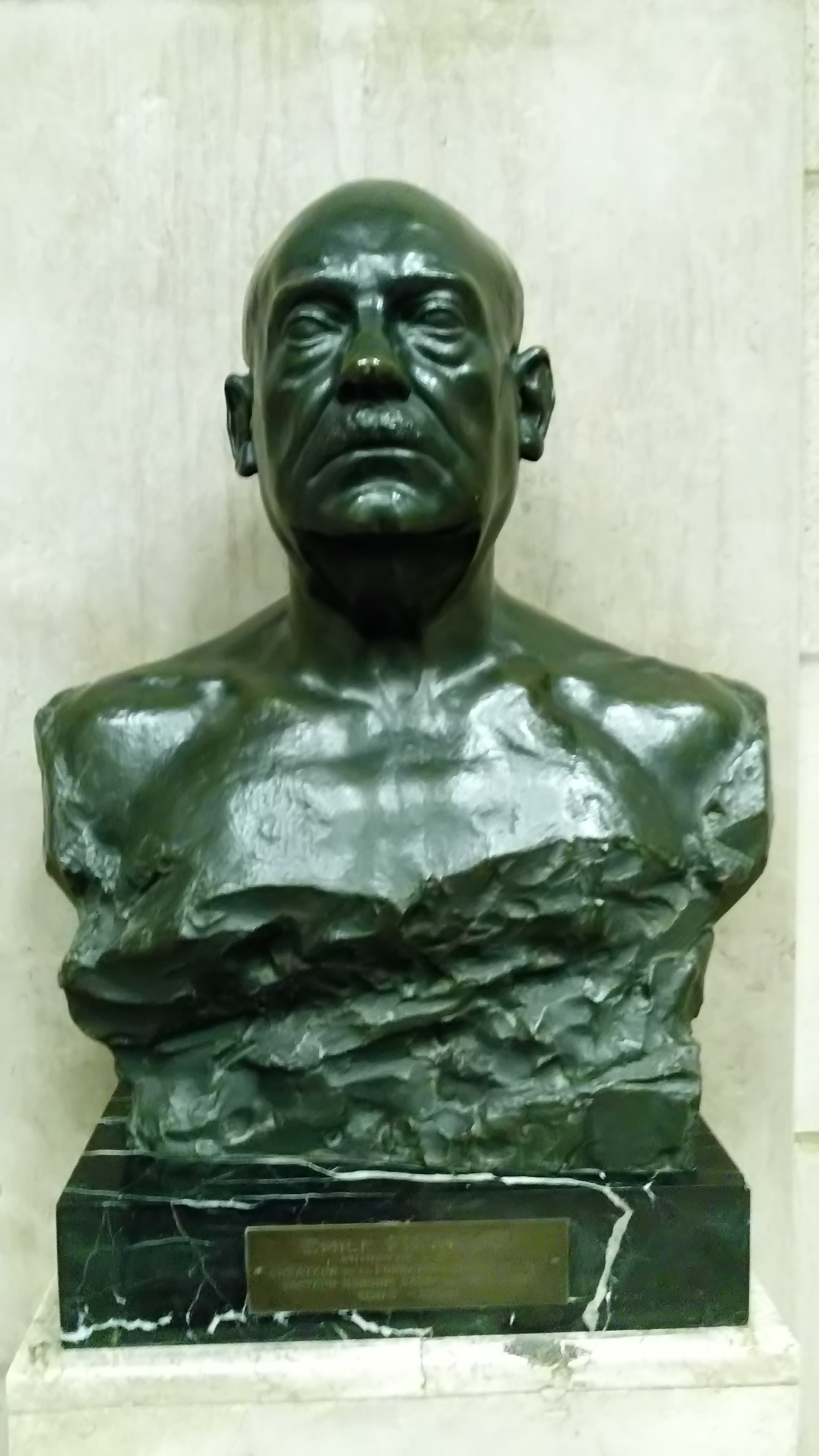 buste d' Emile Francqui (1863-1935) par Jules Lagae. Hall de la grande bibliothèque de l'Université de Leuven, place Mgr Ladeuze